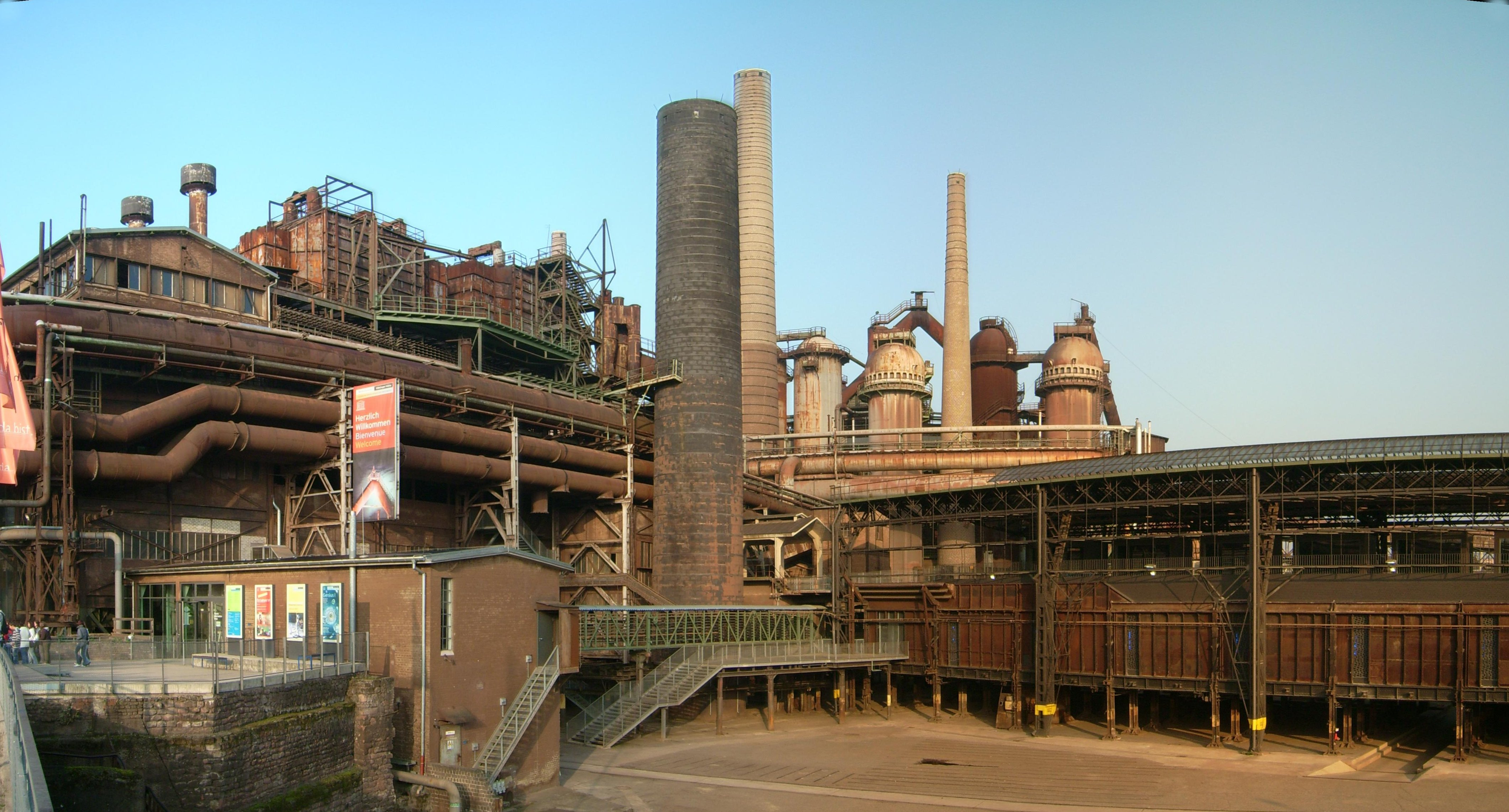 Völklinger Hütte vom Eingang